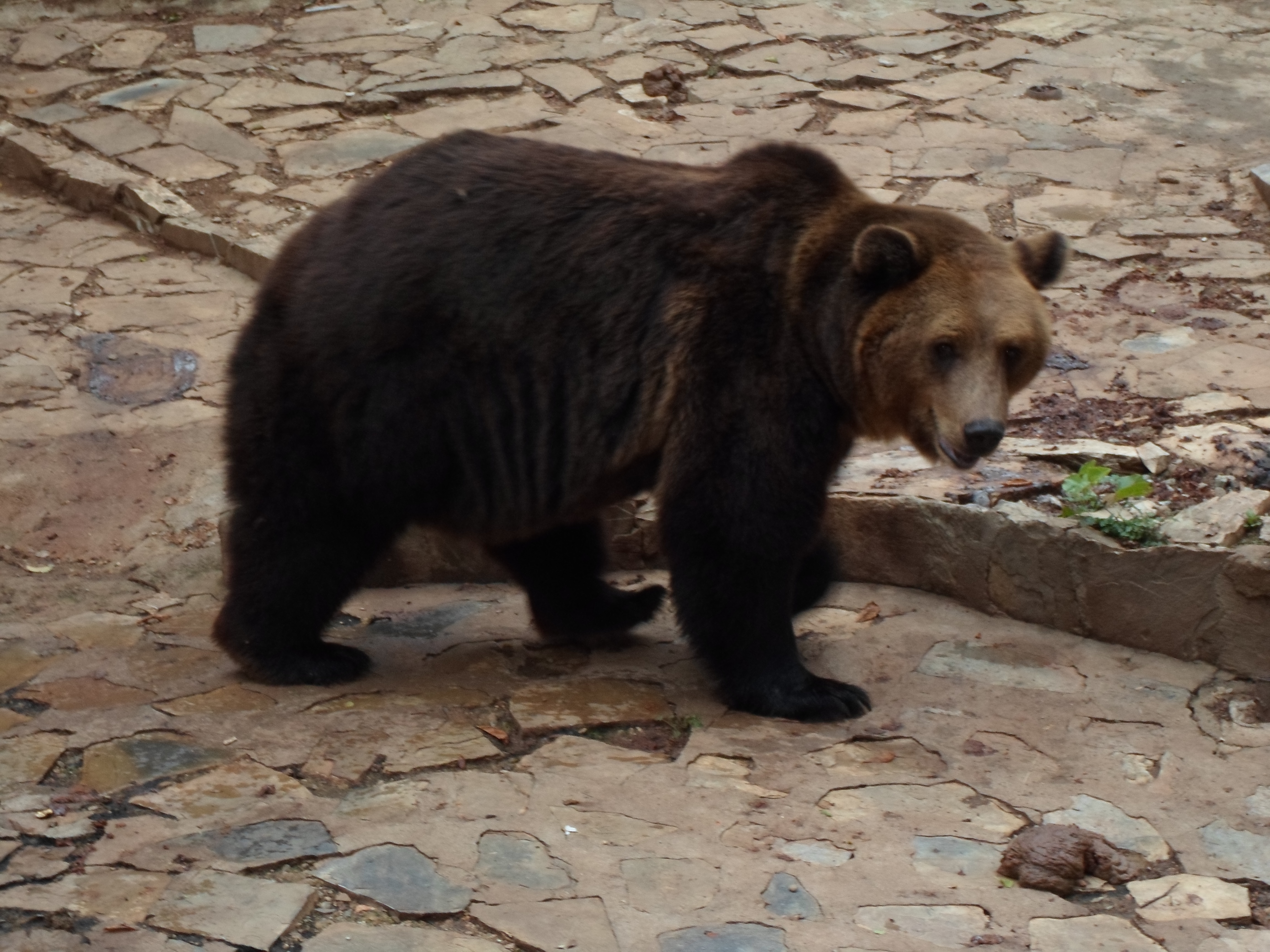 Мечка от Старозагорската зоологическа градина, заснета 2015 г.